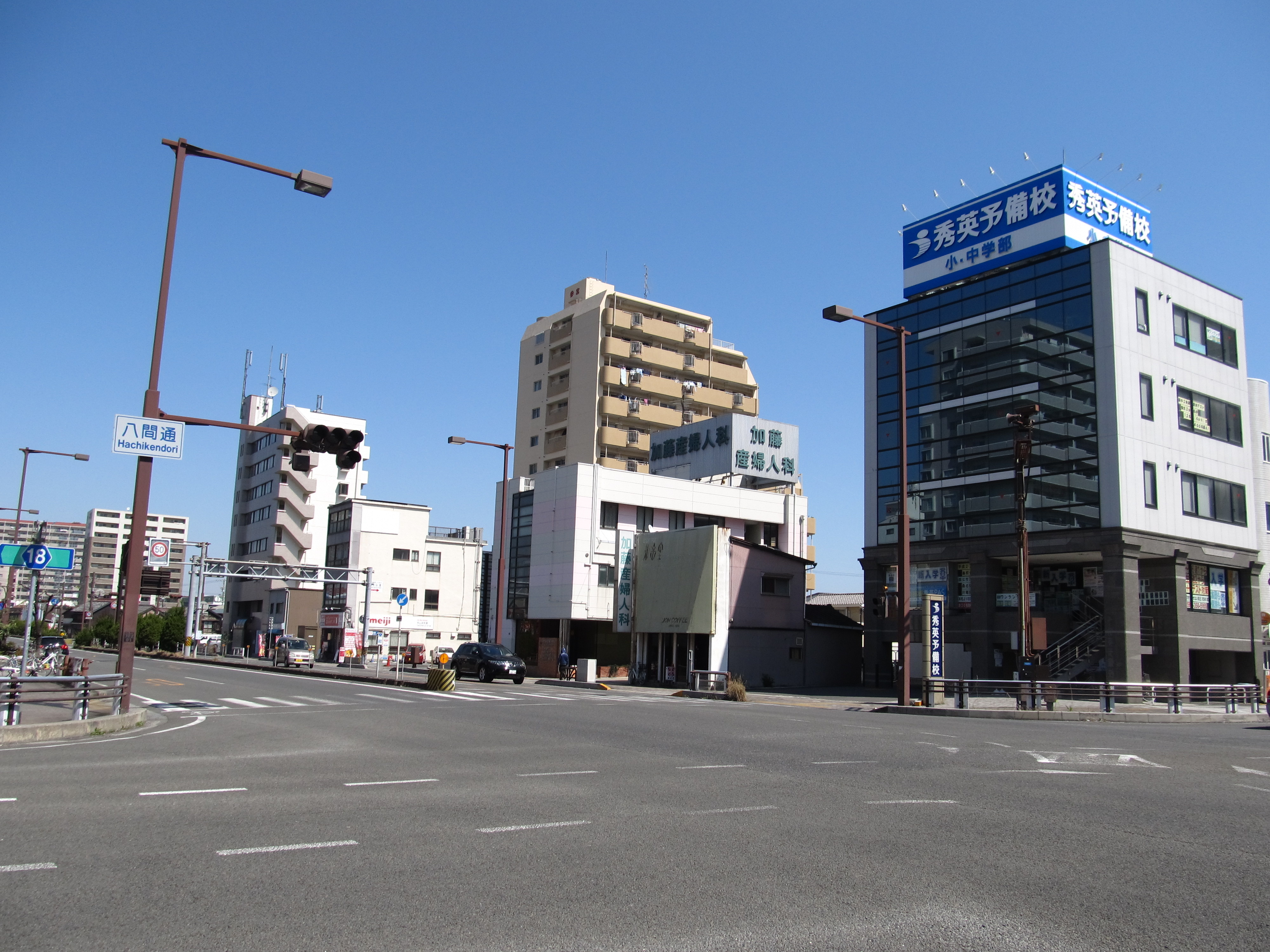 三重県桑名市の八間通交差点。国道1号と三重県道18号桑名停車場線の交点であり、県道18号の終点である。